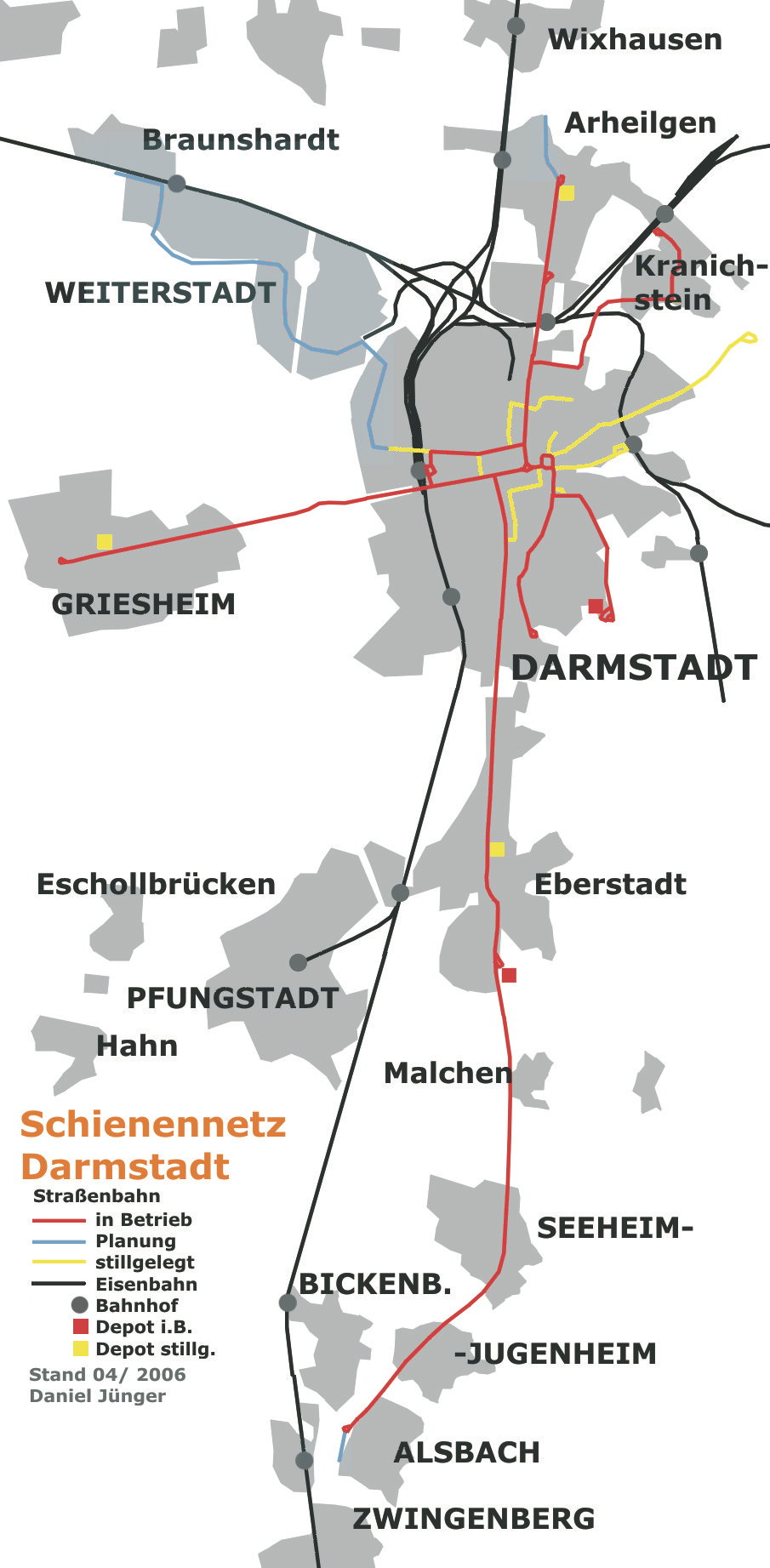 Straßenbahn- und Eisenbahnnetz in Darmstadt